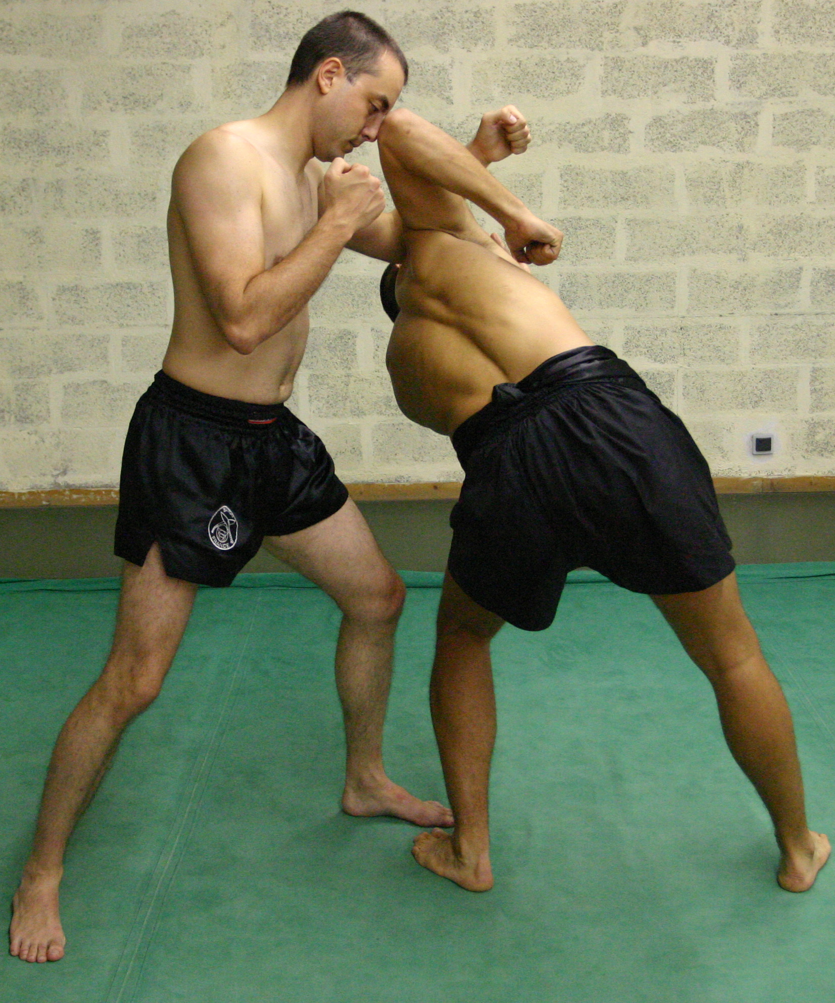 Lethwei-Elbow.jpg